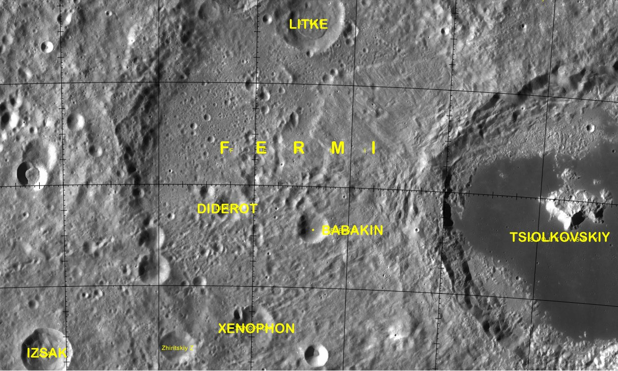 Cráter Diderot